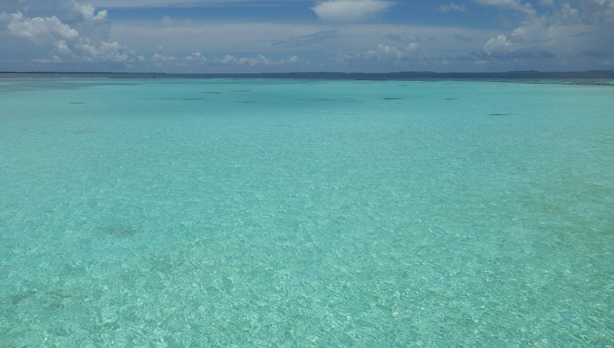 Maldives